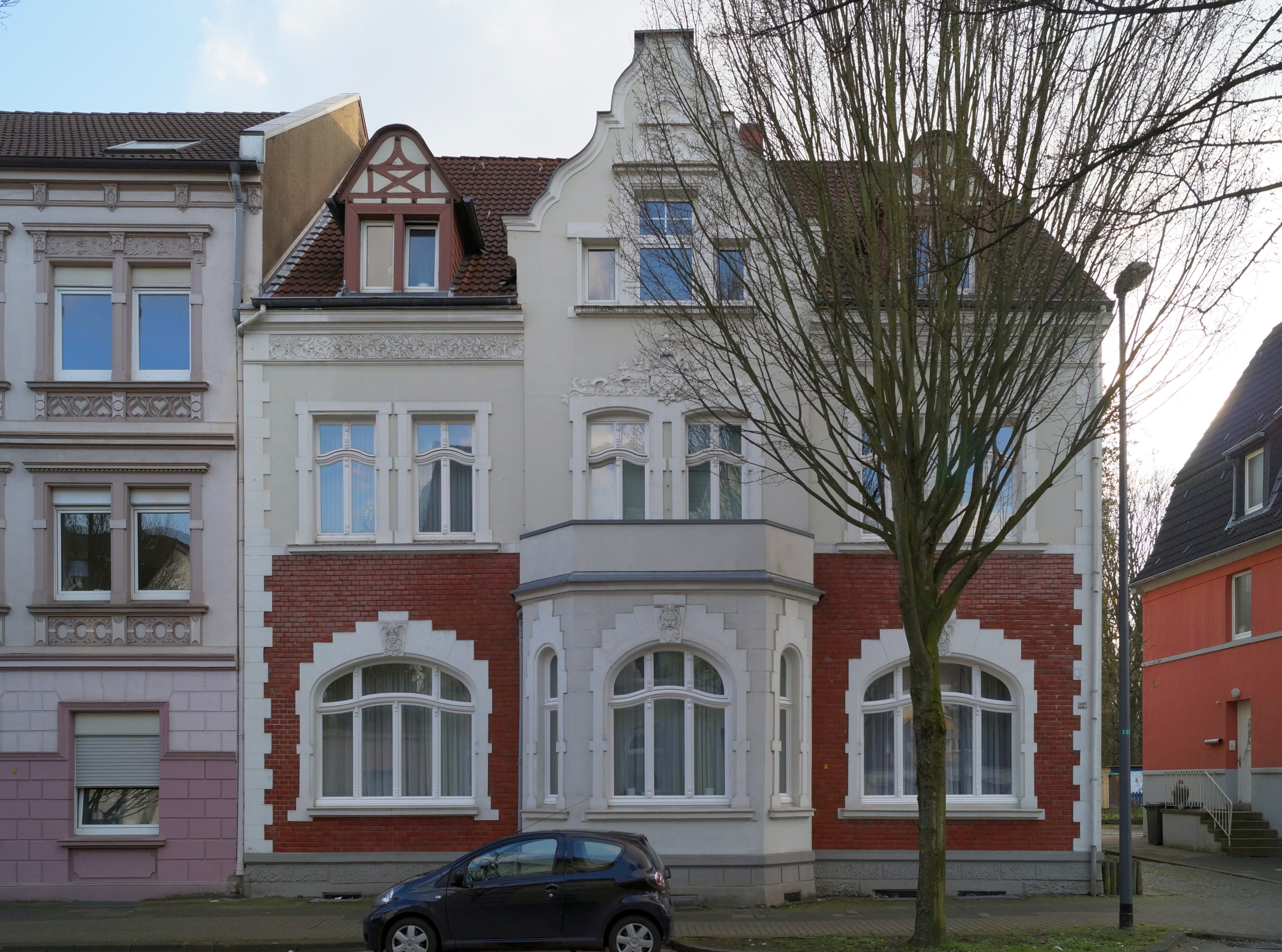 Wohngebäude in Herne-Röhlinghausen, Baudenkmal